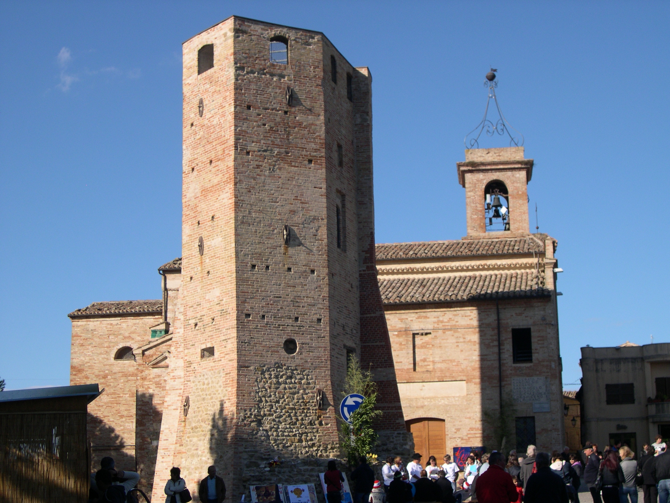 Torre nel comune di Ripe San Ginesio, provincia di Macerata, Italia.